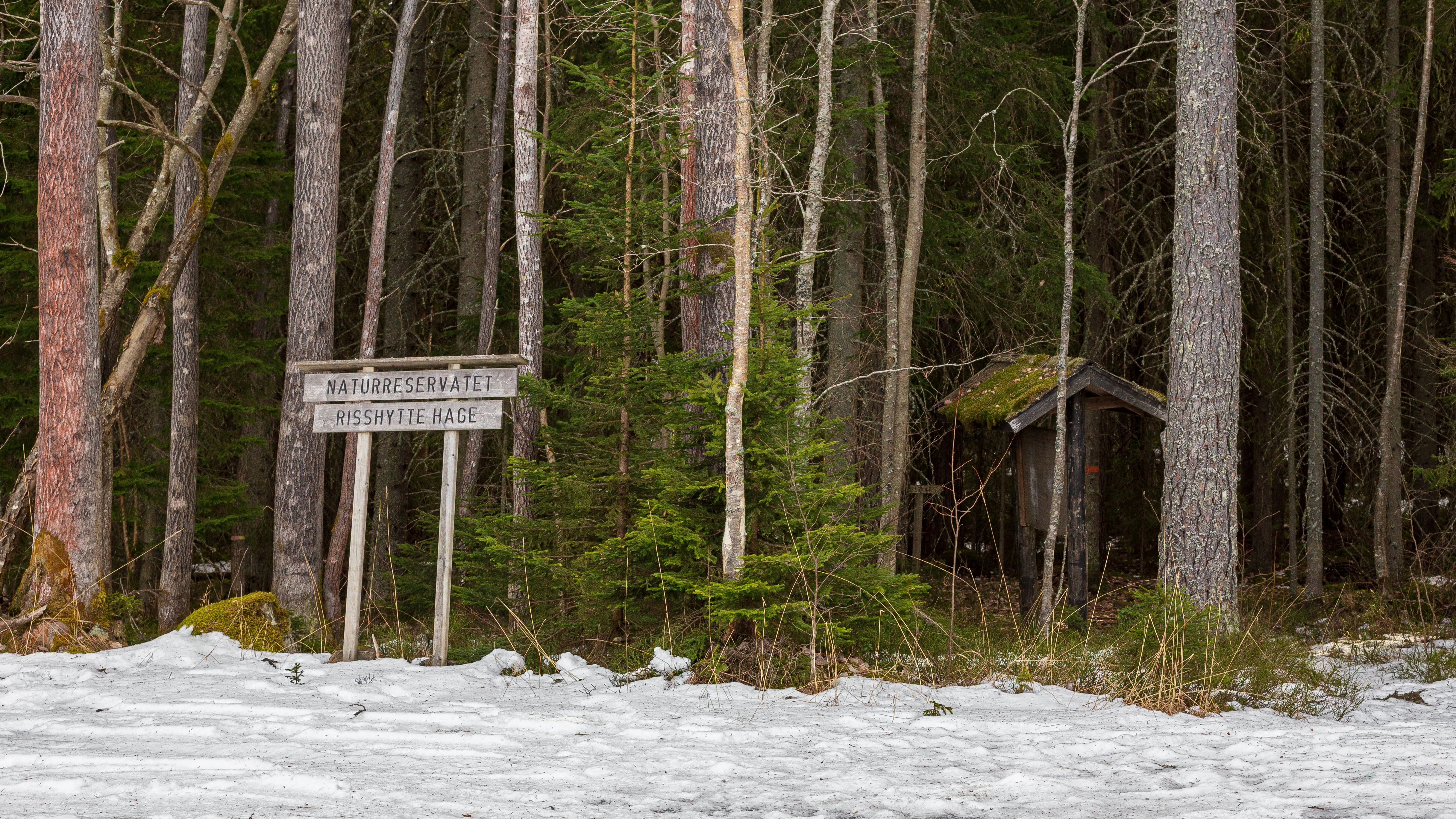 Risshytte hage, Säters kommun, Dalarnas län, Sverige